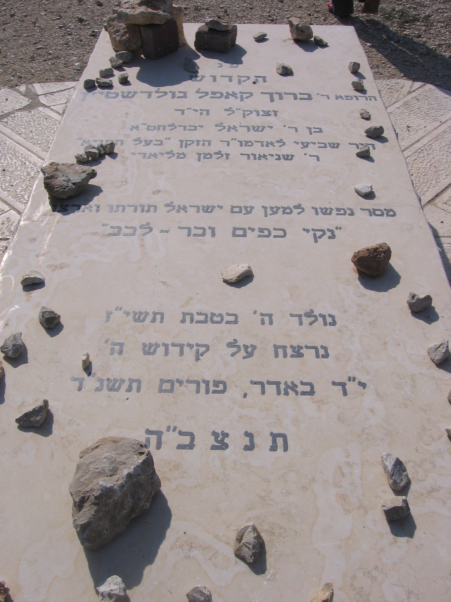 קבר ברוך גולדשטיין